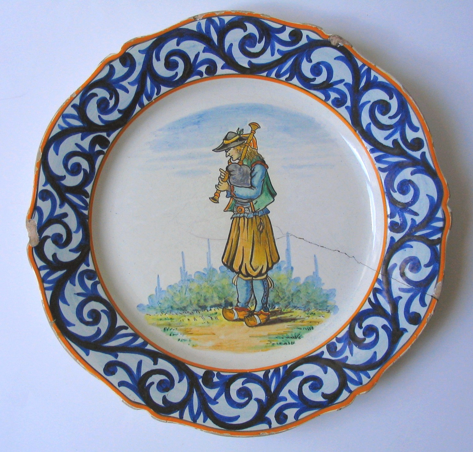 Faïence de Quimper, signé Henriot vers 1910